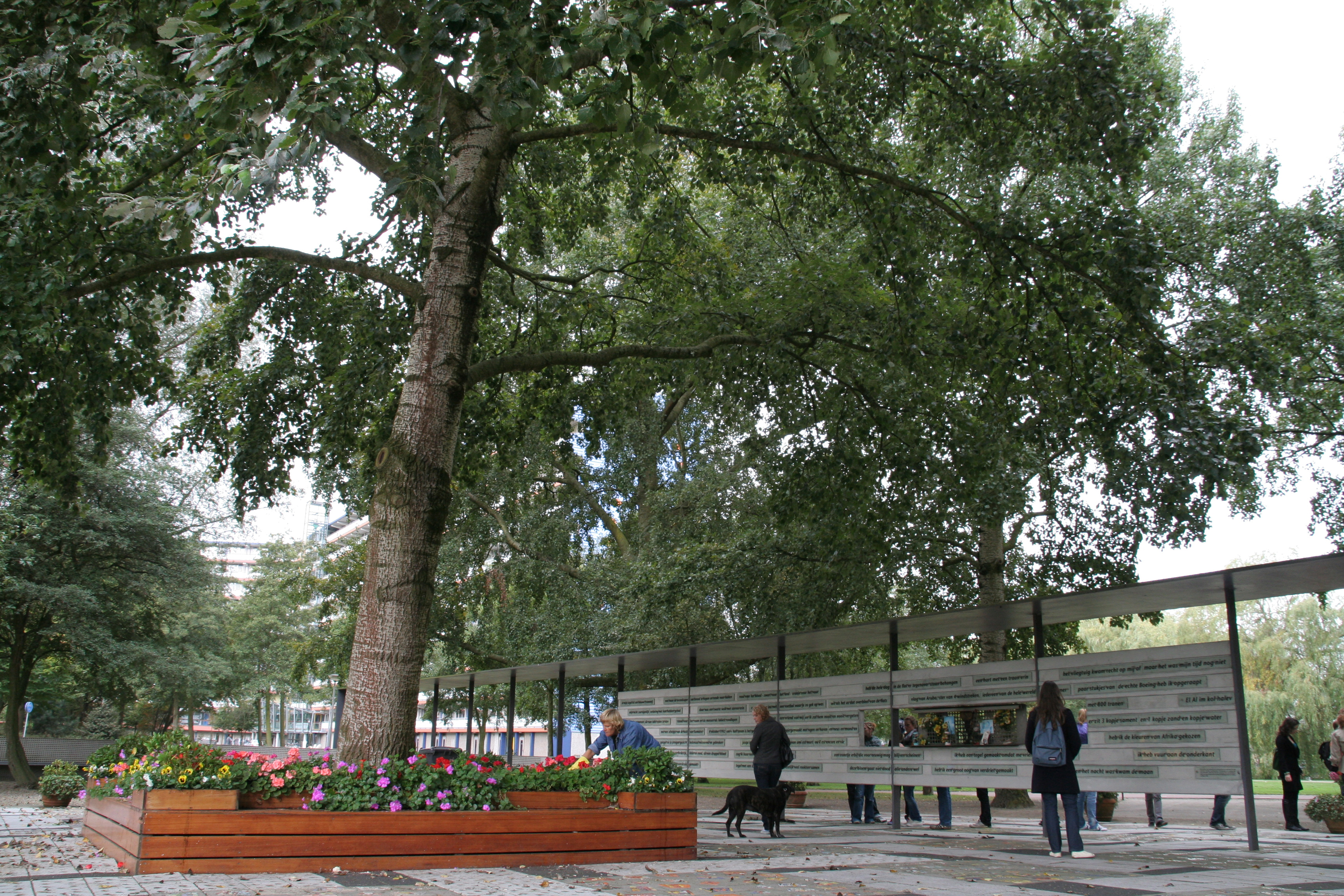 De boom die alles zag. Monument ter herdenking van de slachtoffers van Bijlmerramp in Amsterdam, 4 oktober 1992.